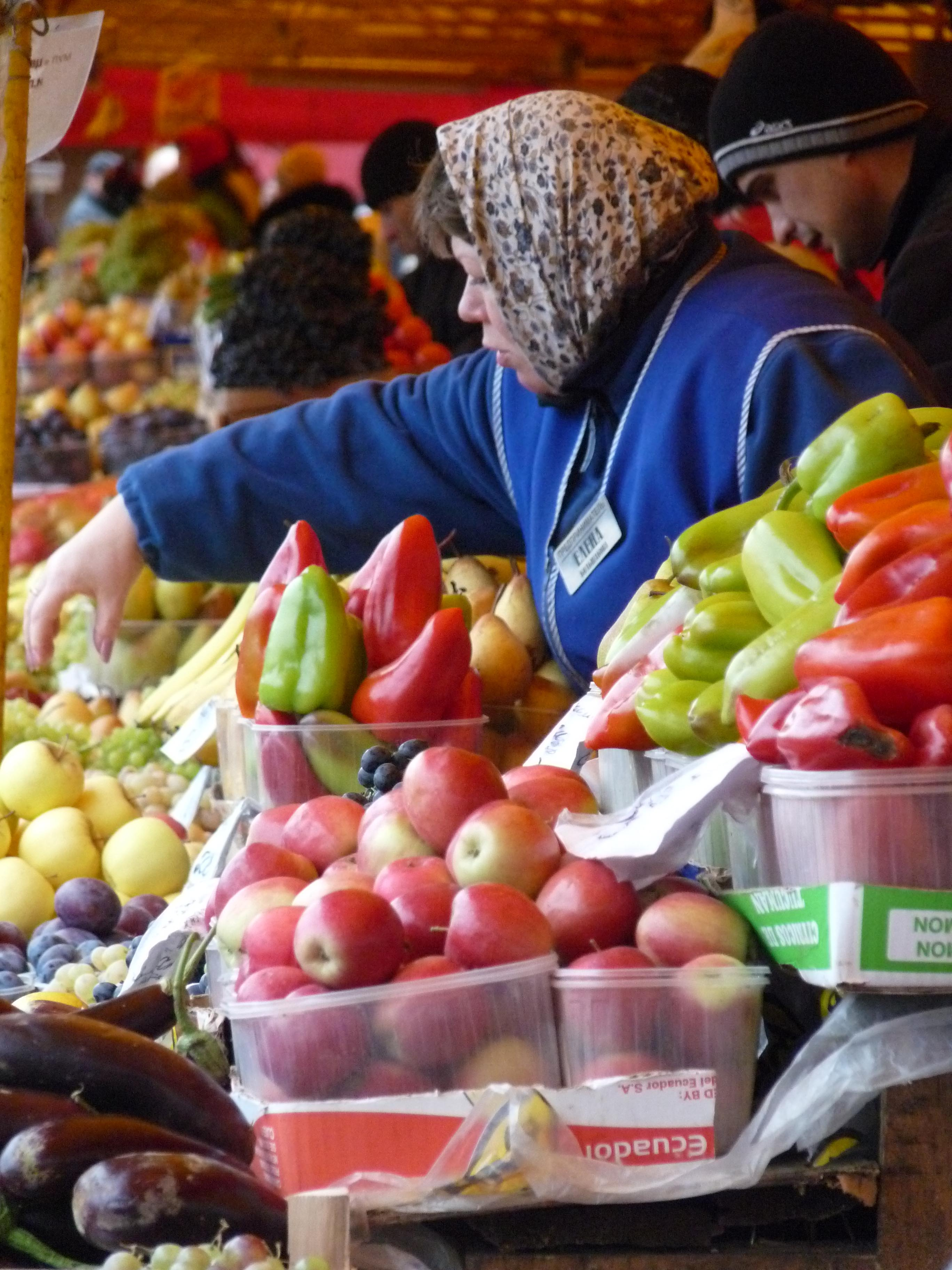 Kostroma Market 06